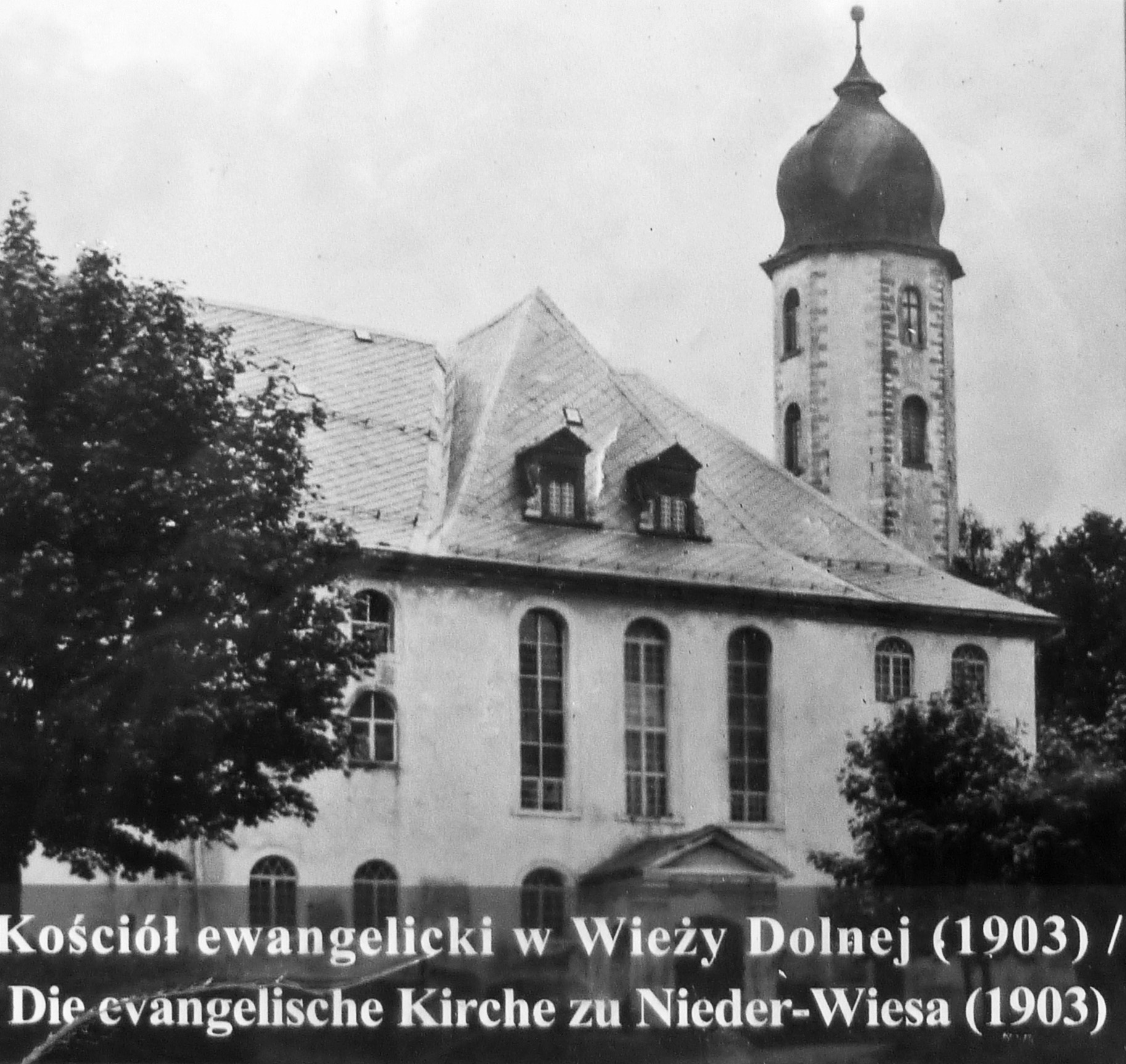 Ehem. evangelische Grenzkirche in Nieder-Wiesa (Wieża) bei Greiffenberg (Gryfów) in der polnischen Oberlausitz